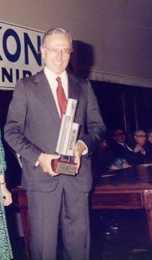 Torcuato S. Di Tella recibiendo el Konex.